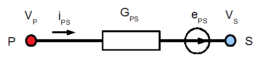 Клон на електрическа верига с източник на е.д.н.